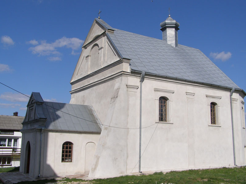 Wojsławice - dawna cerkiew grecko-katolicka z 1771, przejściowo składnica Muzeum Wsi Lubelskiej, obecnie cerkiew prawosławna